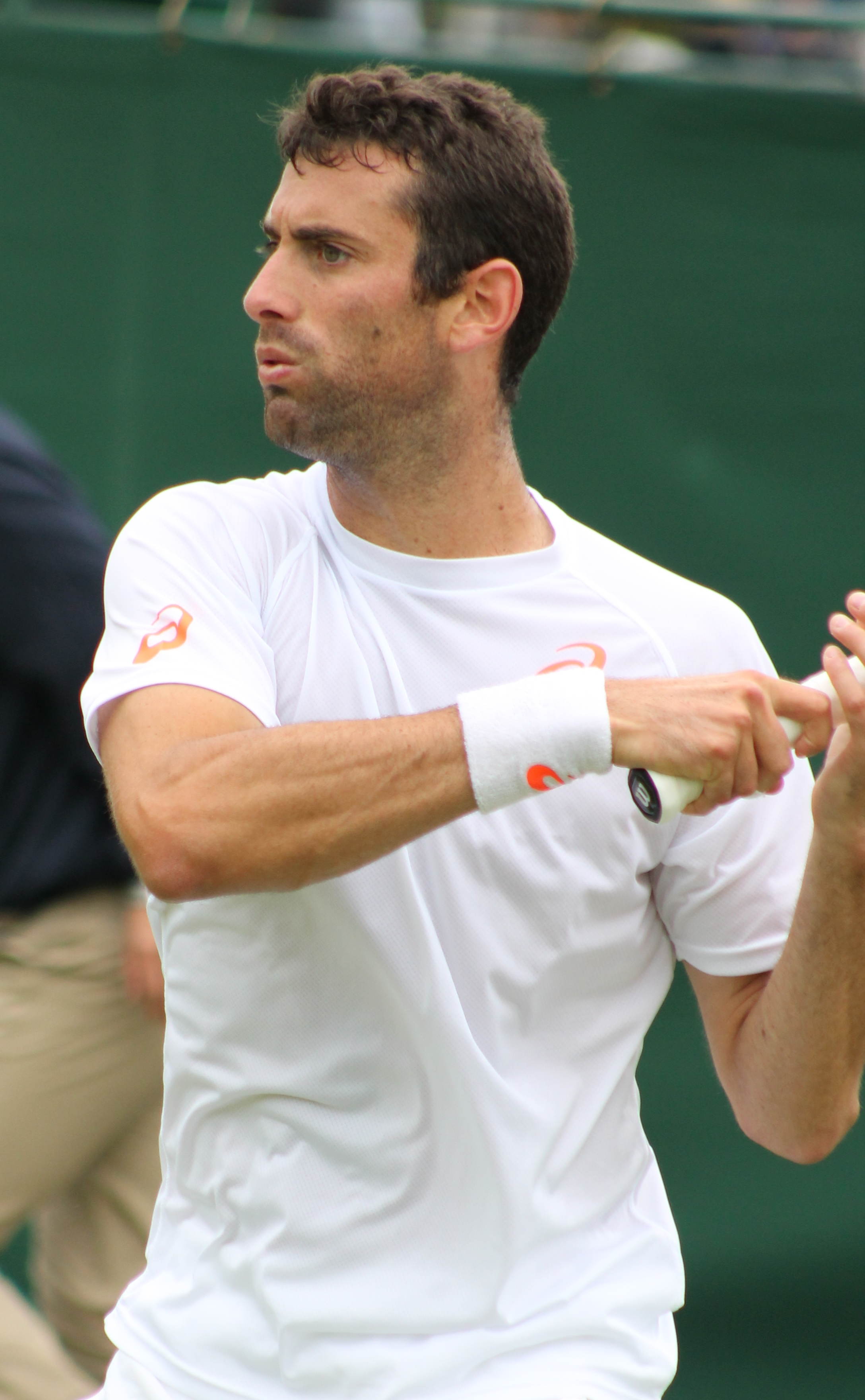 Viola WMQ14 (5)